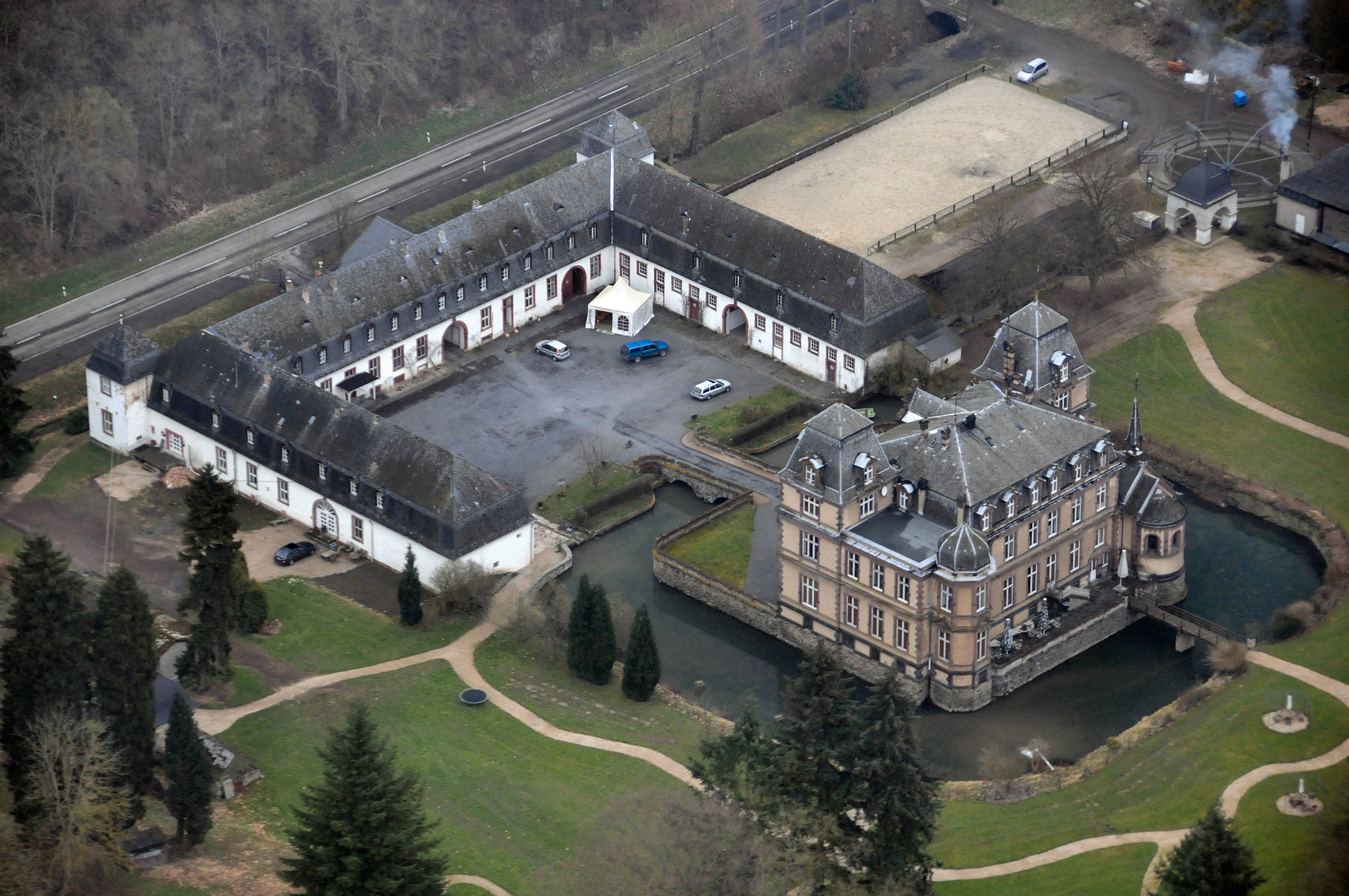 Luftbild des Schlosses Ahrenthal bei Sinzig